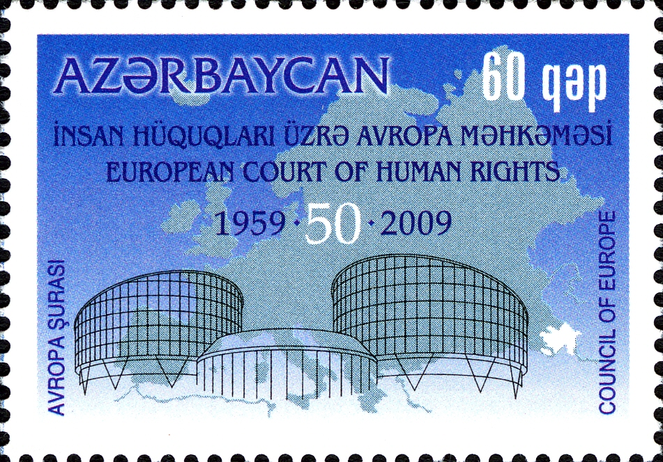 50th Anniversary of European Court of Human Rights